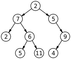 Primjer binarnog stabla.